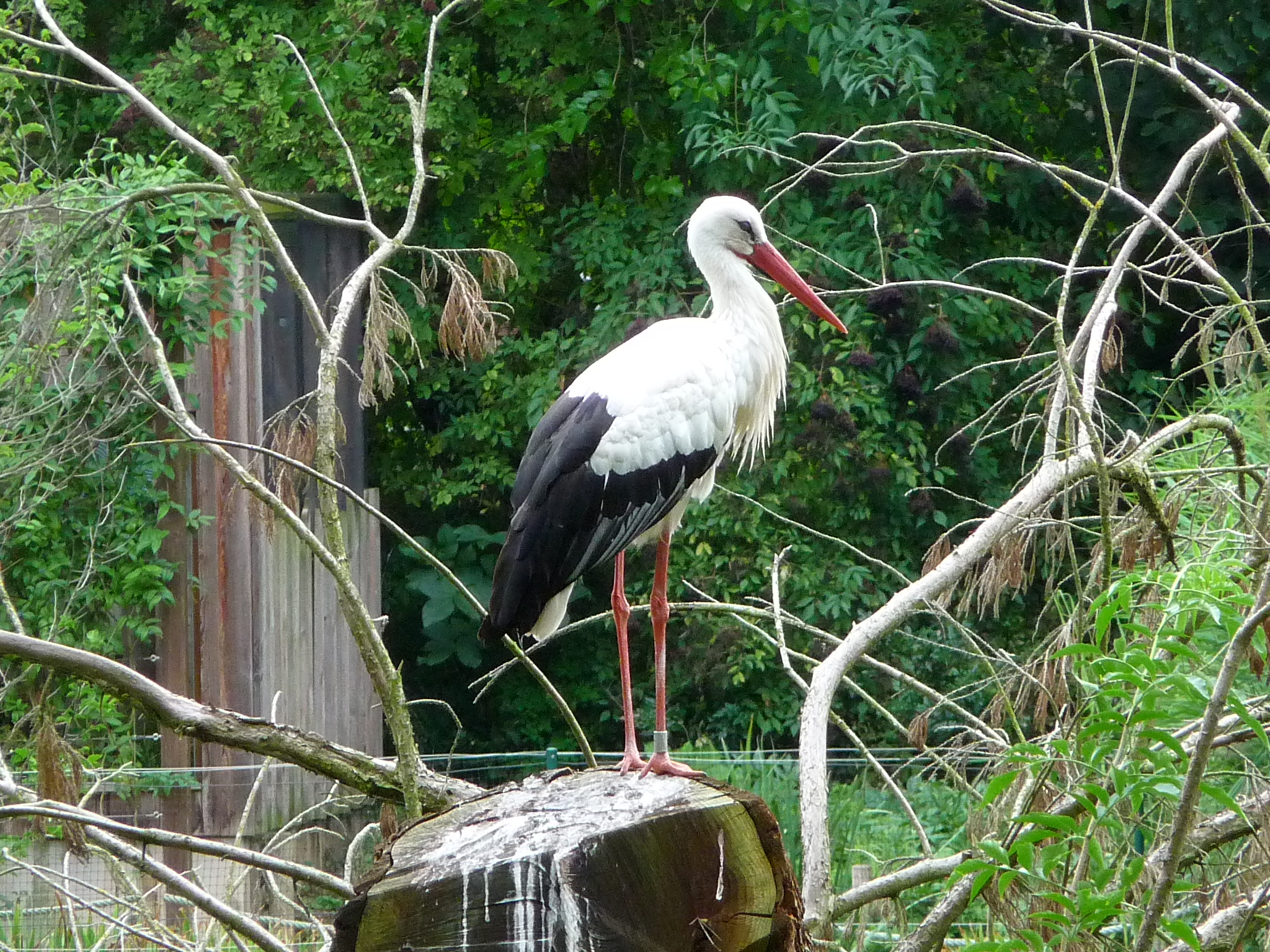 Weißstorch (Ciconia ciconia)